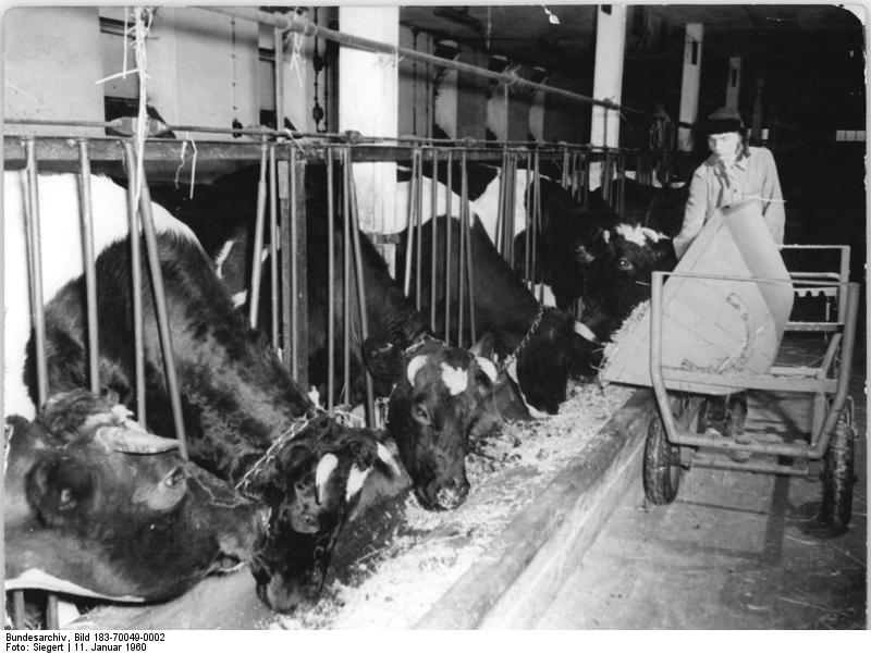 Berreuth, Bauer beim Füttern Zentralbild Siegert 11.1.1960 Genossenschaftsbauern von Berreuth beschreiten den Weg zum Weltniveau Zur Lösung der ökonomischen Hauptaufgabe stellt sich die LPG Berreuth, Bezirk Dresden, das Ziel, einen Kuhbesatz je 100 hektar von 65 Tieren zu erreichen; das Marktaufkommen je Hektar in diesem Jahr auf 1700 Liter Milch und 215 kg Fleisch zu steigern. Die Genossenschaftsbauern werden 10% der Ackerfläche mit Silomais bestellen. UBz: Unter solchen Bedingungen arbeiten die LPG-Mitglieder in Berreuth. Melker Roland Gietzel füttert mit dem Futterkarren. Das vollgenossenschaftliche Dorf bringt heute täglich nahezu 1000 Liter Milch auf den Markt, das ist doppelt soviel wie in dem alten, einzelbäuerlichen Berreuth.